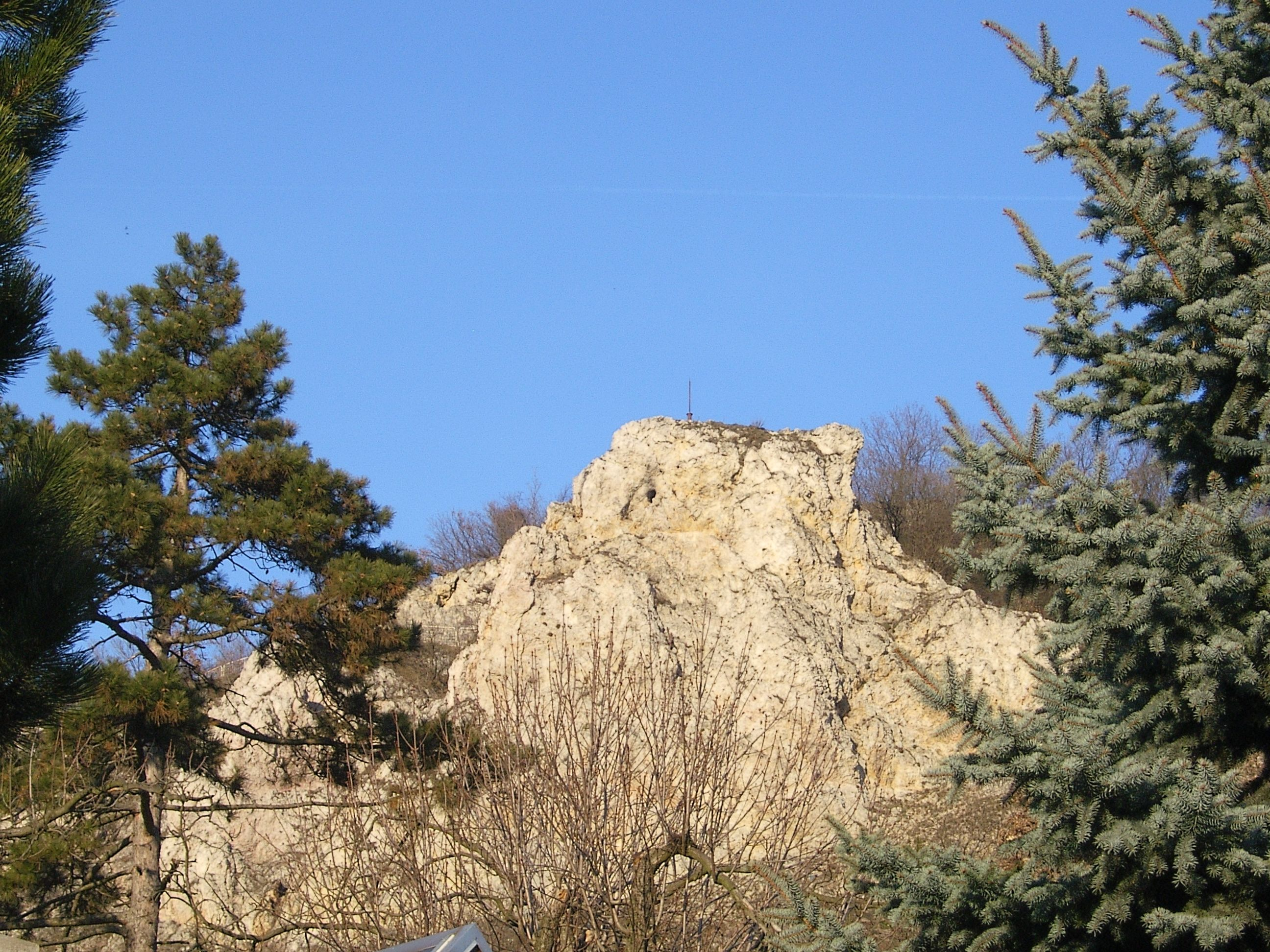 Apáthy-szikla (Pasarét, Budapest II.)